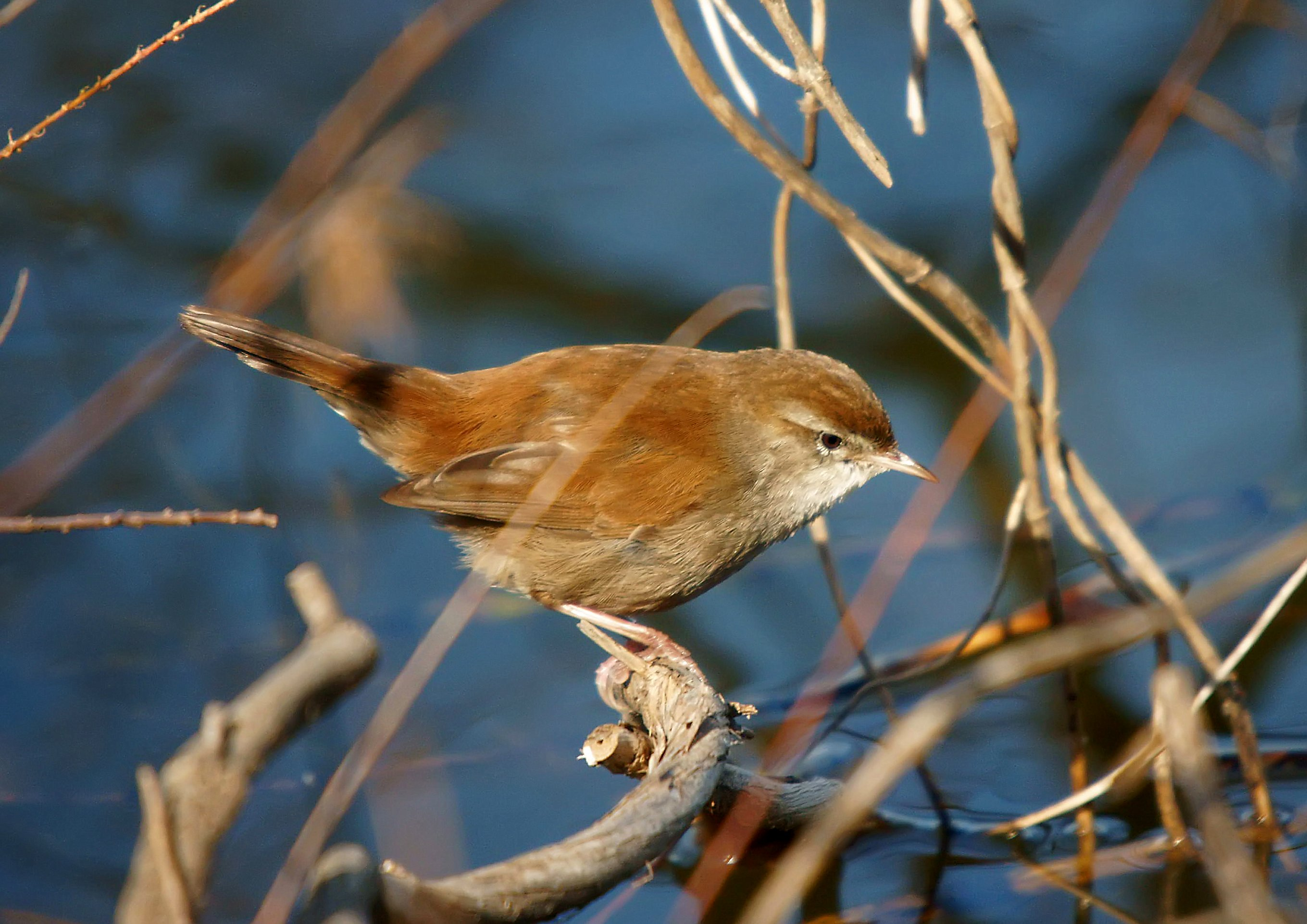 Rossinyol bord - Ruiseñor bastardo - Cetti's Warbler - Cettia cetti, Viladecans, Catalunya, Spain